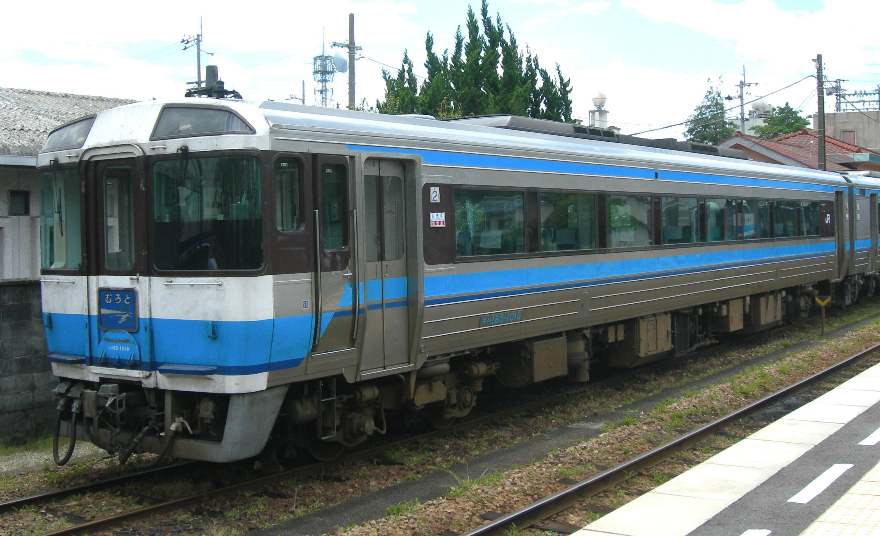 キハ185-1018